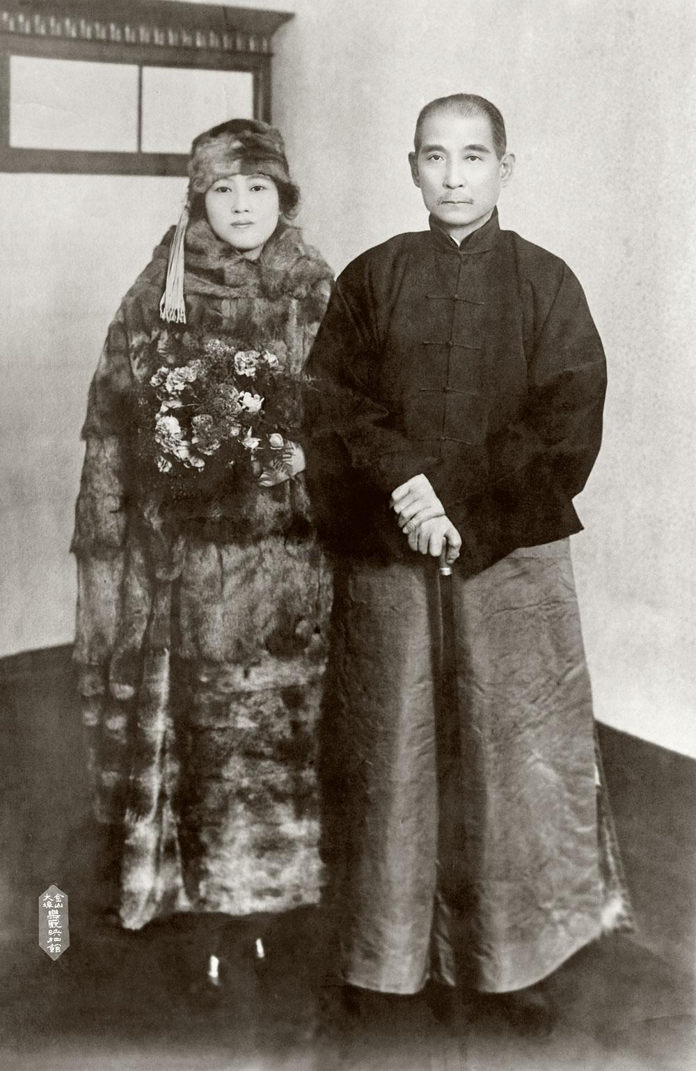 photo of Soong Ching-ling and Sun Yat-sen